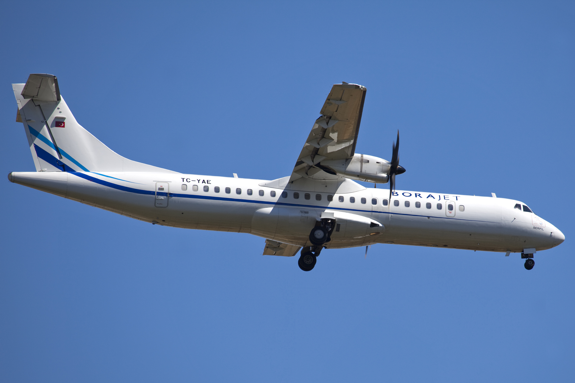 Antalya